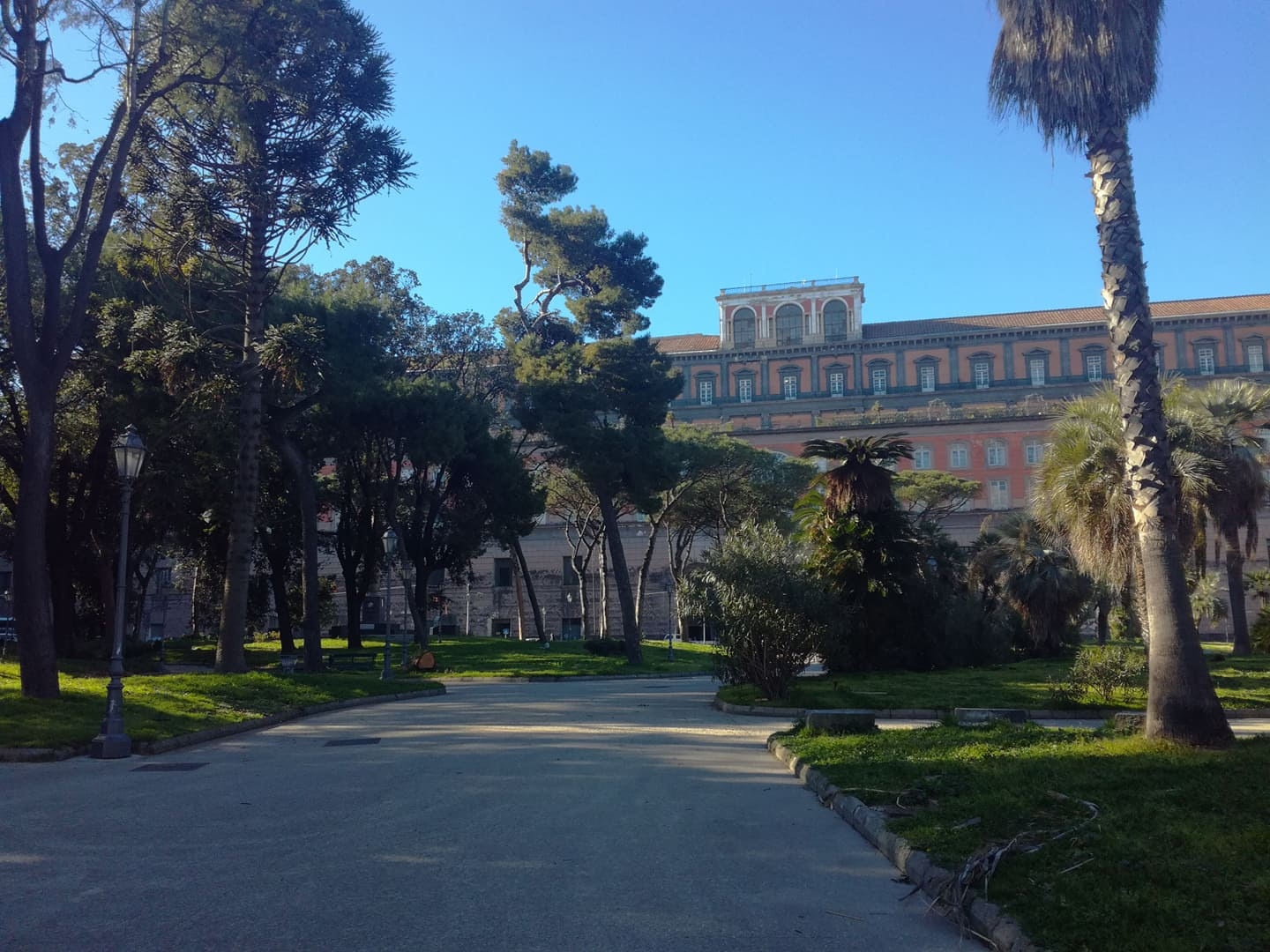 Giardini del Molosiglio